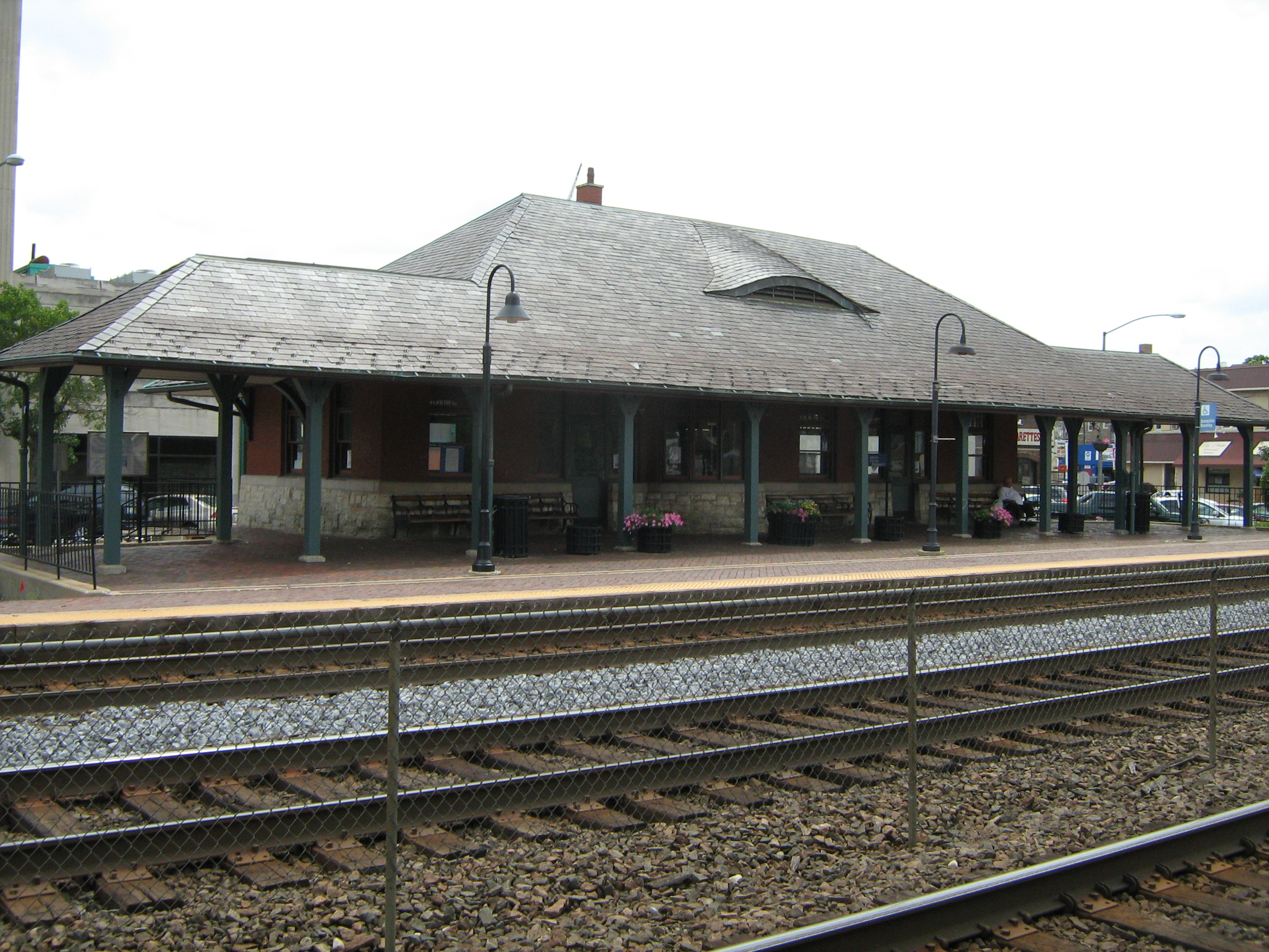 6801 W. Windsor Ave. Berwyn, IL 60402 (708) 484-6534 Metra Burlington Northern Santa Fe (BNSF) Line Zone B